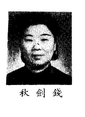 中文（中国大陆）: 制憲國民大會代表